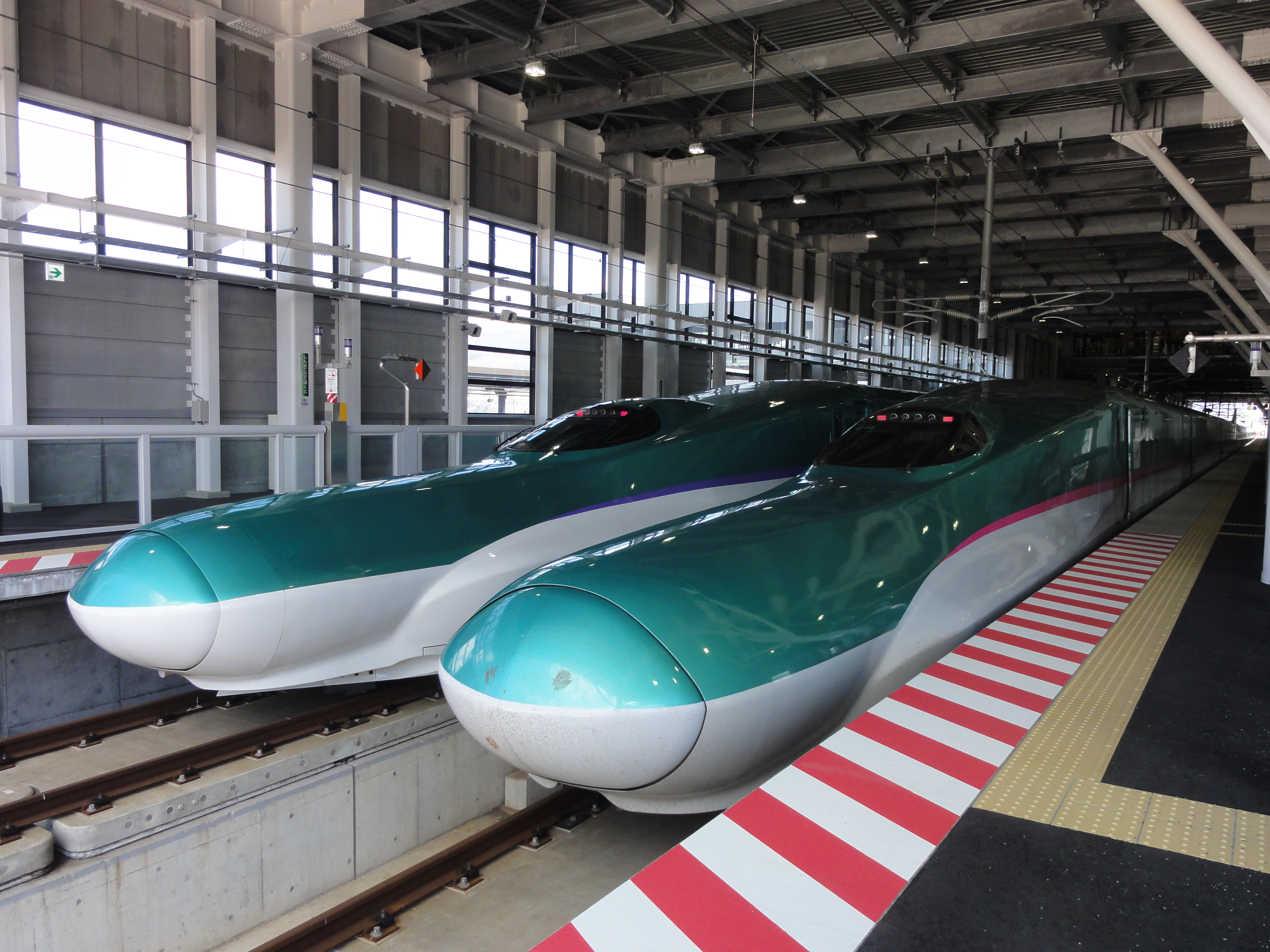 新幹線H5系・E5系電車 新函館北斗で撮影